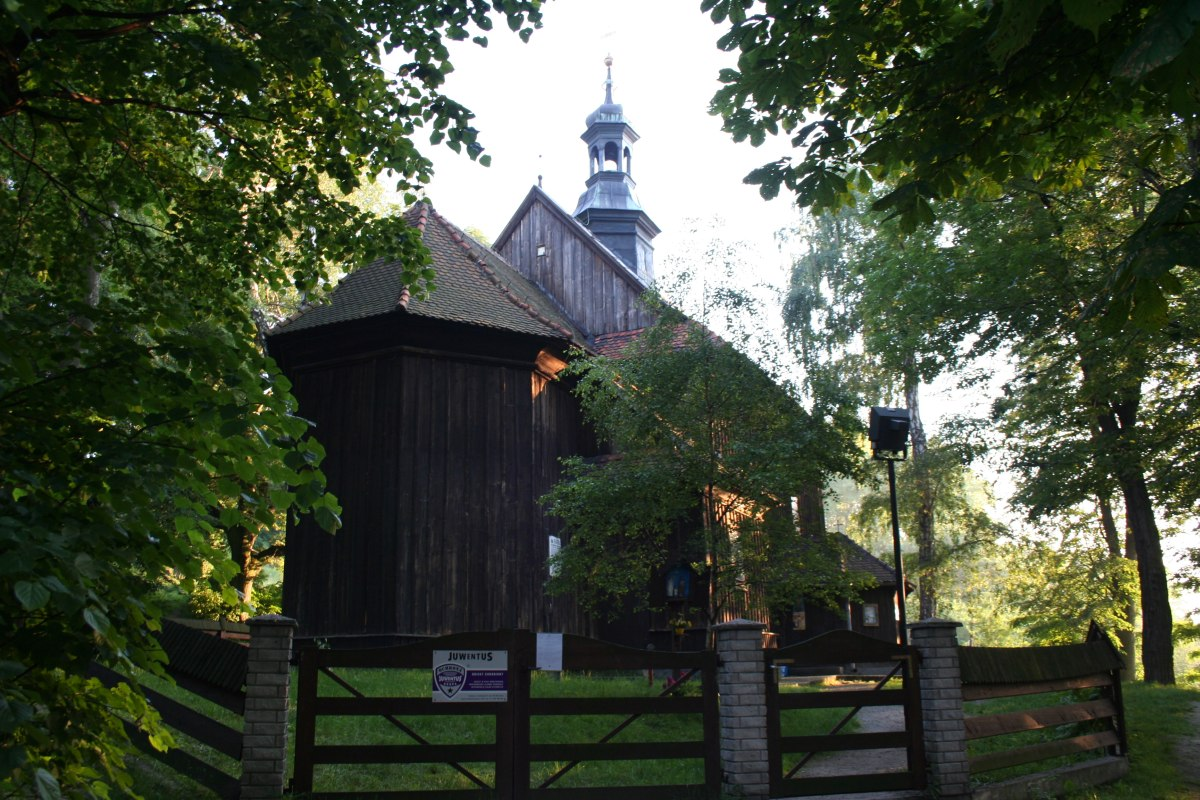 Kościół św. Sebastiana w Wieliczce. Autor- Marek Czerwiński